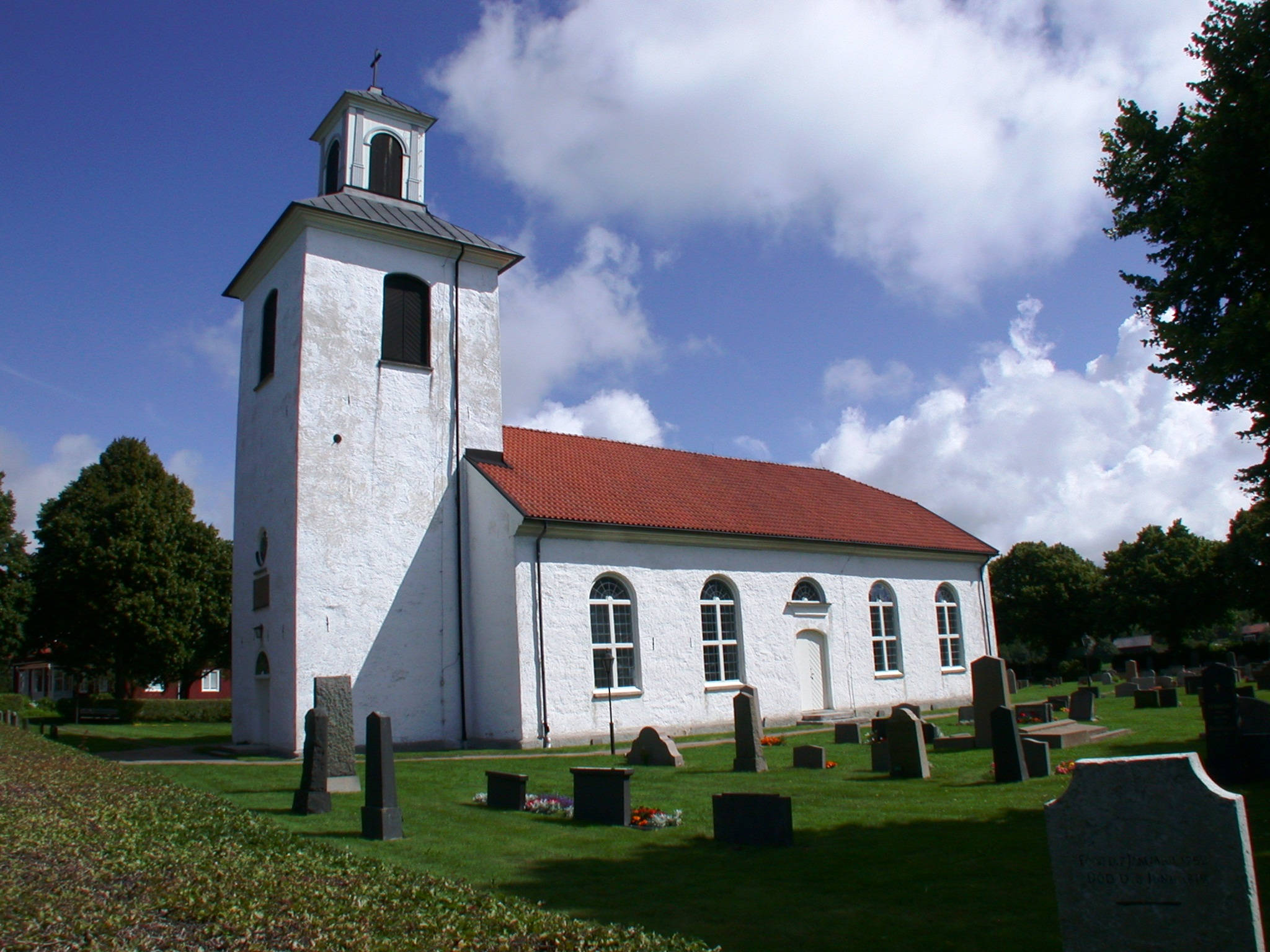 Torsö kyrka, Mariestad, Sweden